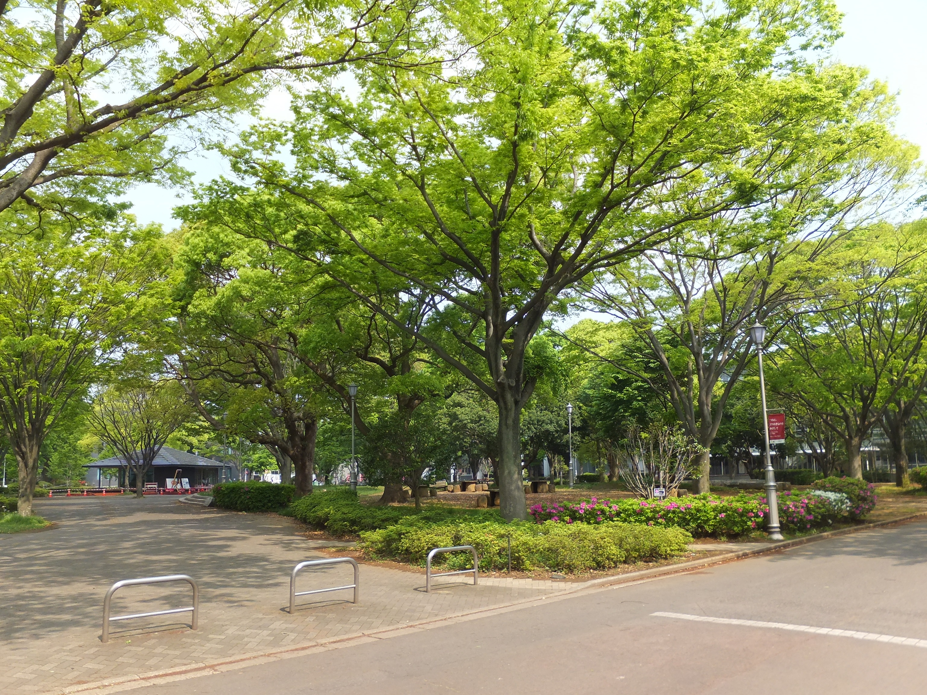 新緑の語らいの森